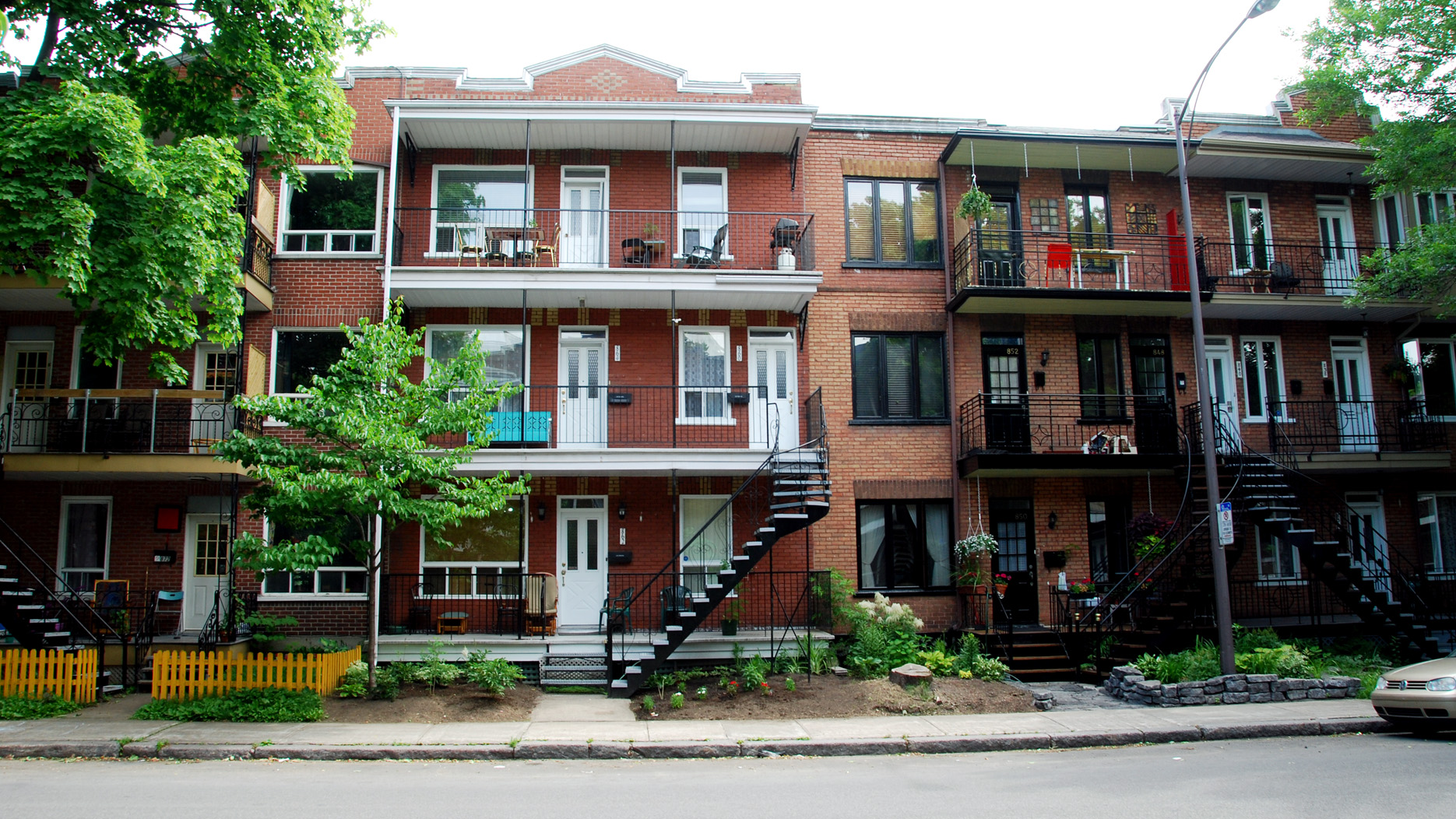 Bloc appartement du Vieux-Limoilou, 2e avenue